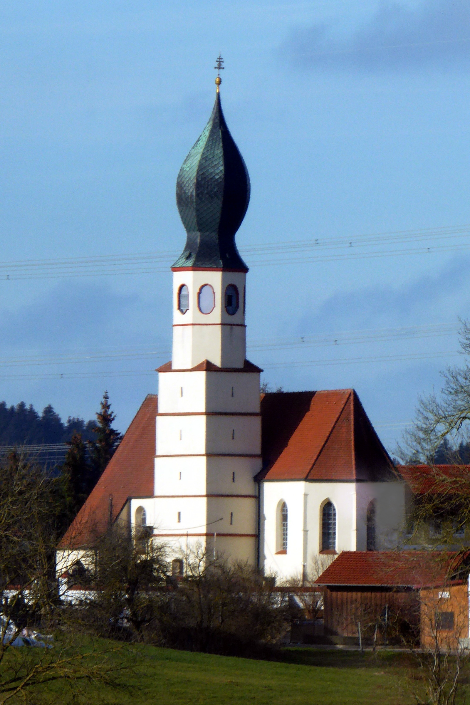 Boarisch: D' Schtefanskiach z' Nidagoaslboch, vo Sidostn xeng.